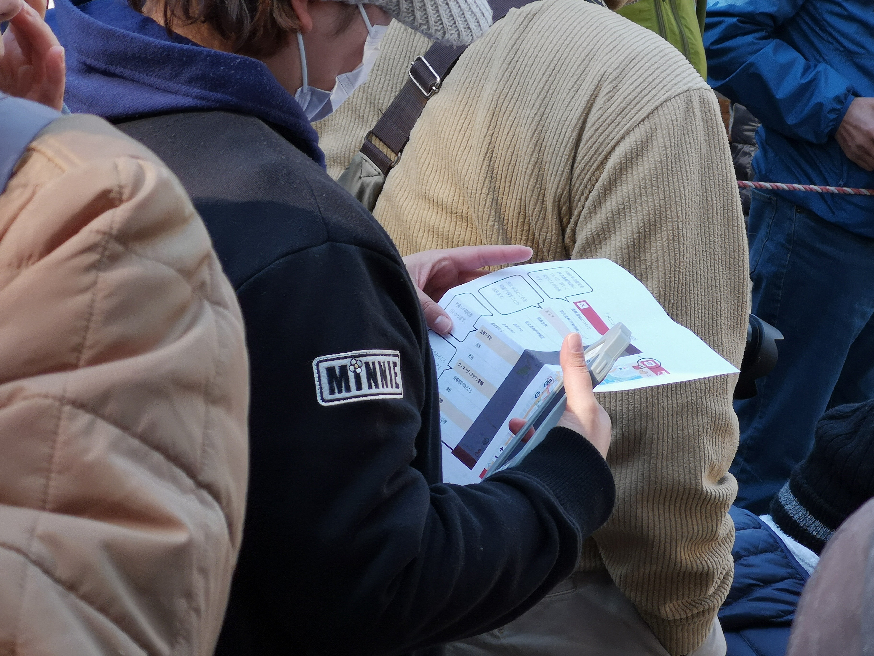 豊橋鬼祭おにどこアプリの説明を読む観客